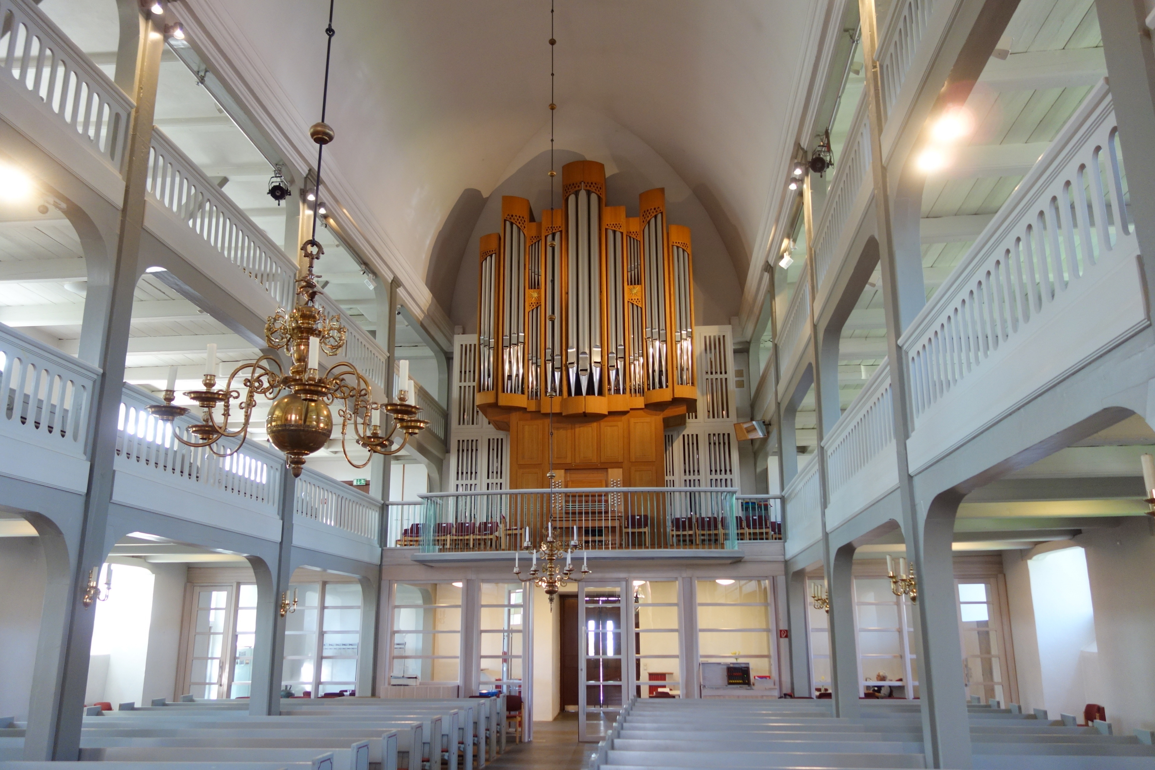 St. Peter und Paul Bad Oldesloe, Kreis Stormarn, Schleswig-Holstein, Deutschland